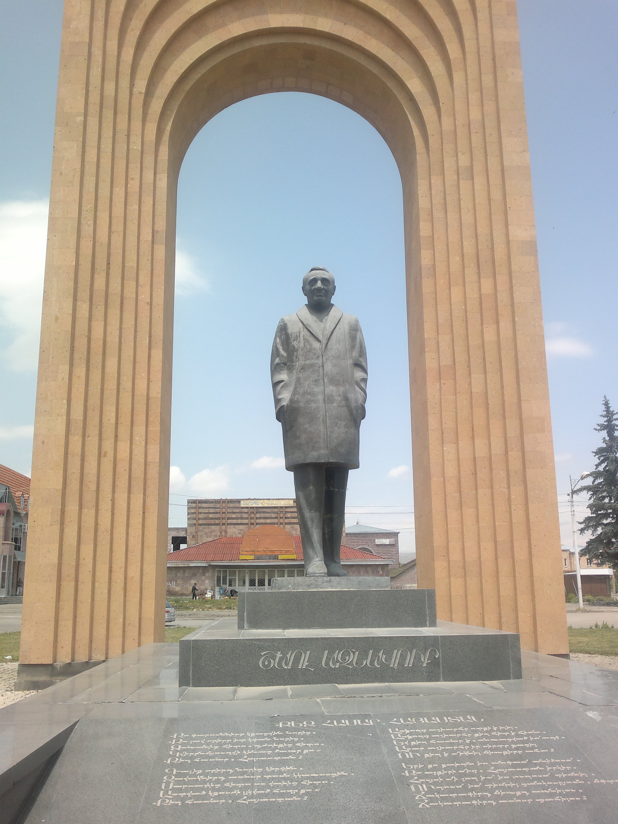 Շառլ Ազնավուրի հուշարձանը Գյումրիում 1/4.875